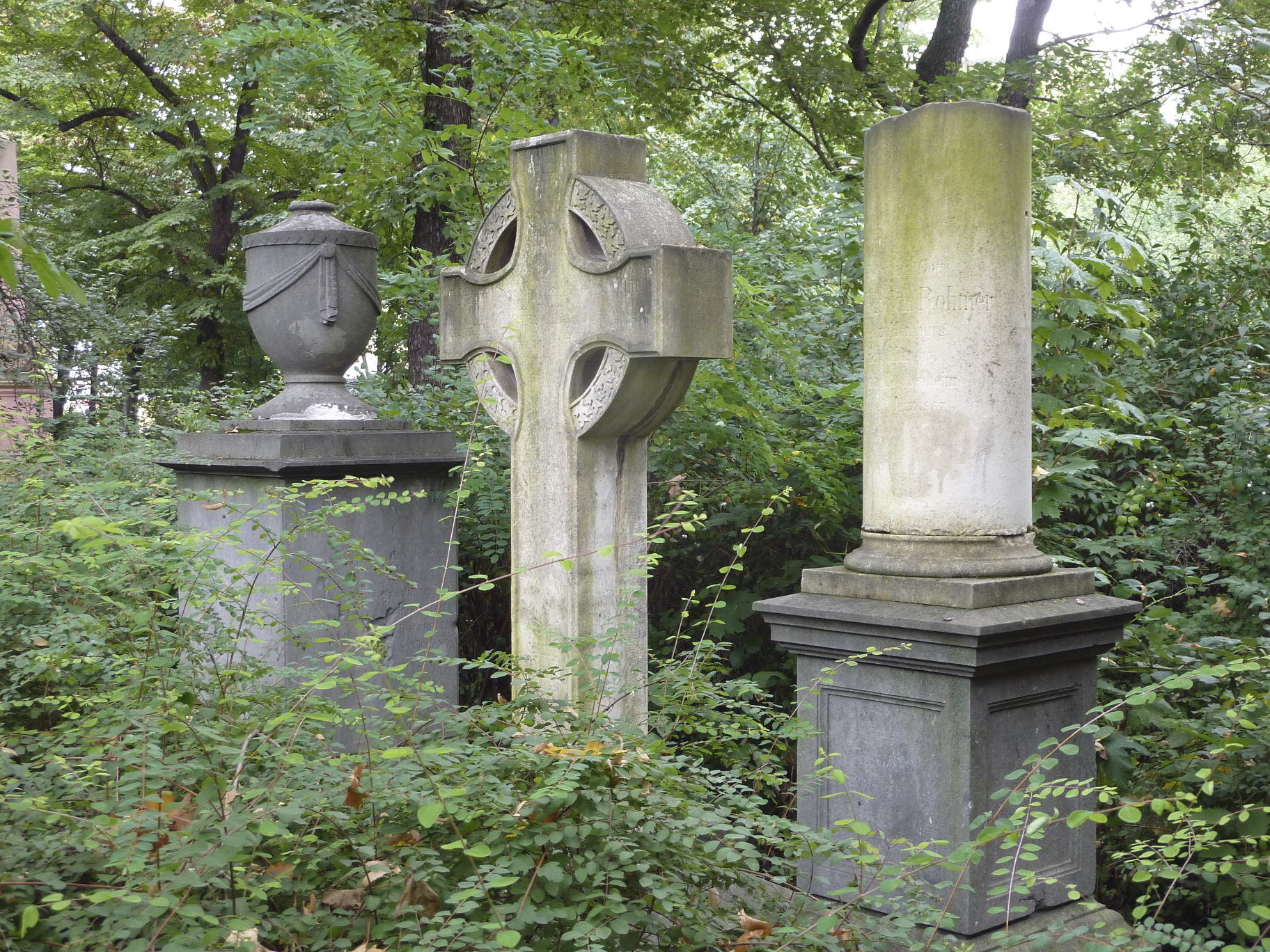 Frankfurt am Main, Stadtteil Bockenheim: Der Alte Friedhof Bockenheim ist ein von 1825 bis 1898 für Begräbnisse genutzter Friedhof, der im Jahr 1916 zu einer öffentlichen Grünanlage umgewidmet wurde. Das Foto zeigt die Grabstätte der Bockenheimer Familie Rohmer im Jahr 2014